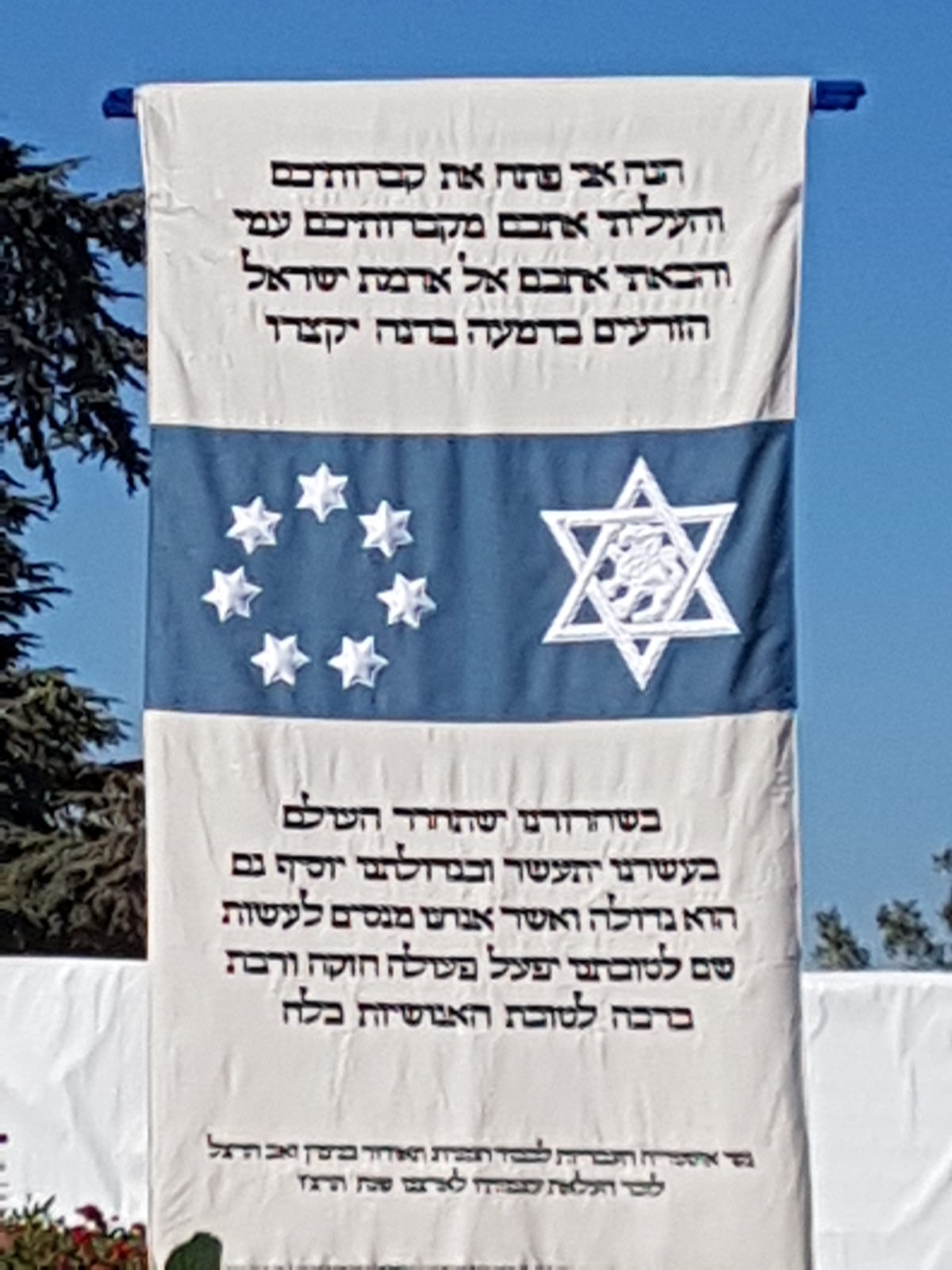 חשיפת פרוכת ארון הקבורה המשוחזרת של בנימין זאב הרצל, 70 שנה לאחר שנעלמה